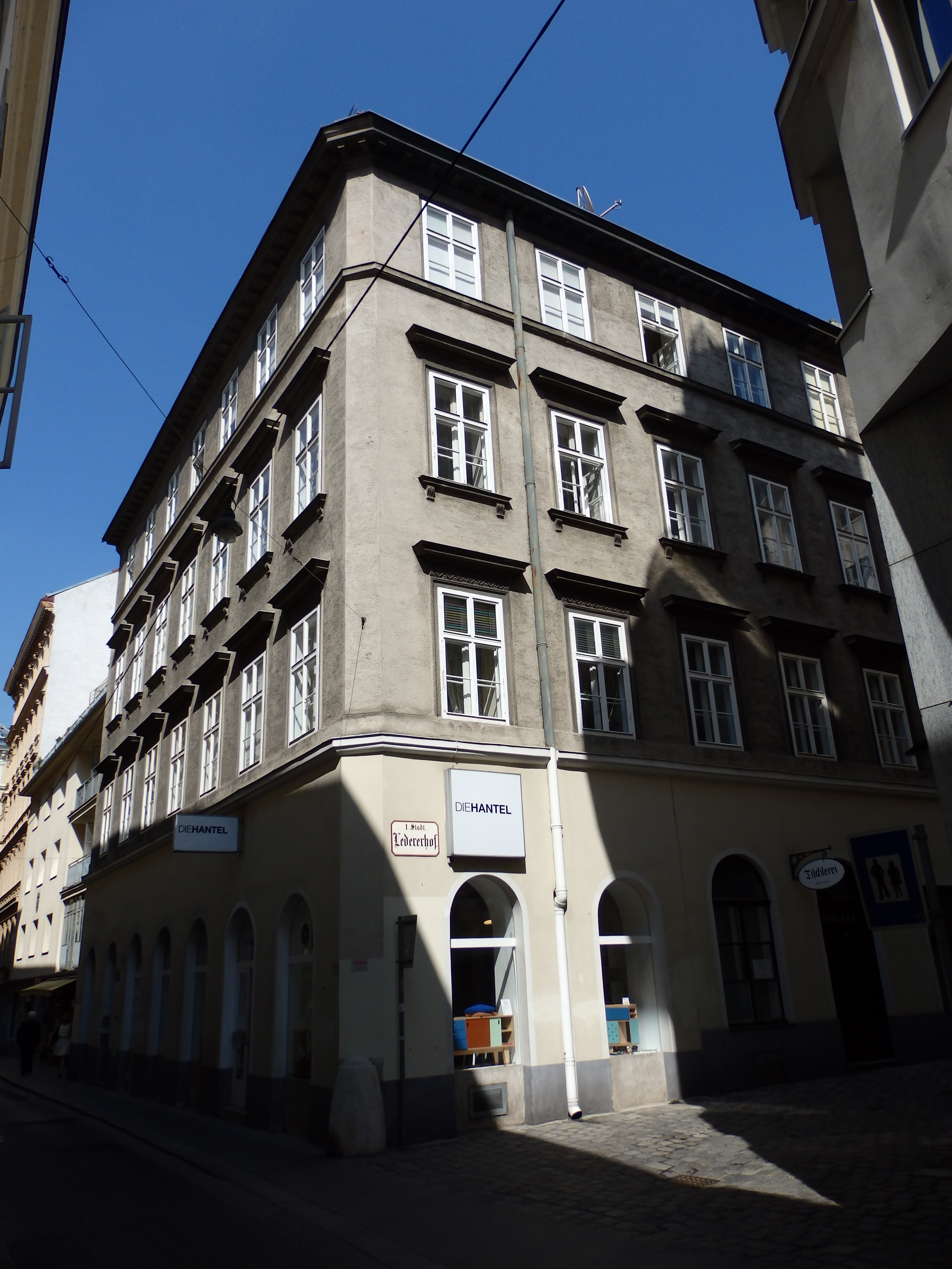 Haus Zum goldenen Stiefel (1807) von Josef Koch, Färbergasse 6, Wien-Innere Stadt